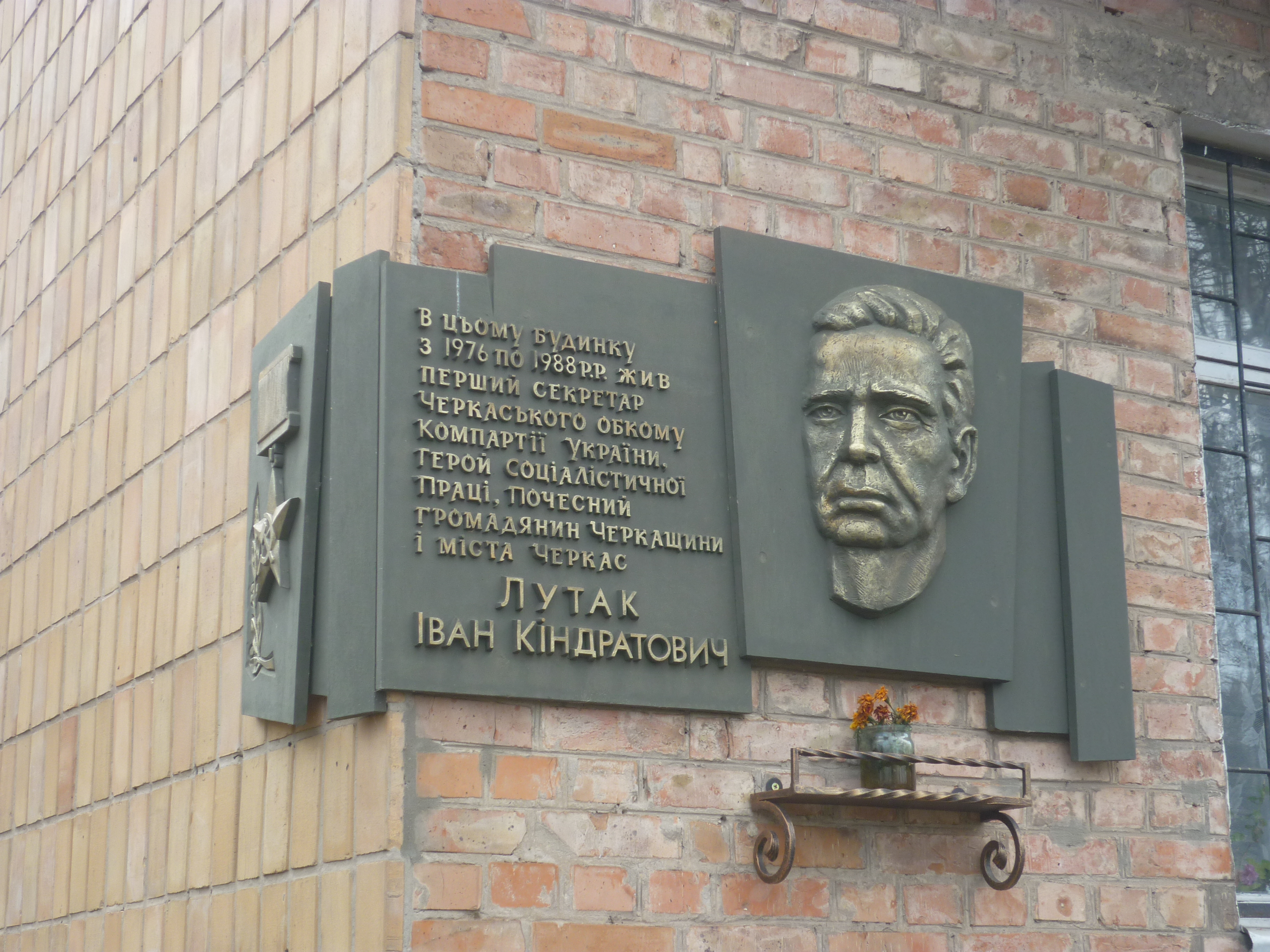 Пам'ятна дошка на будинку де жив Лутак Іван Кіндратович.